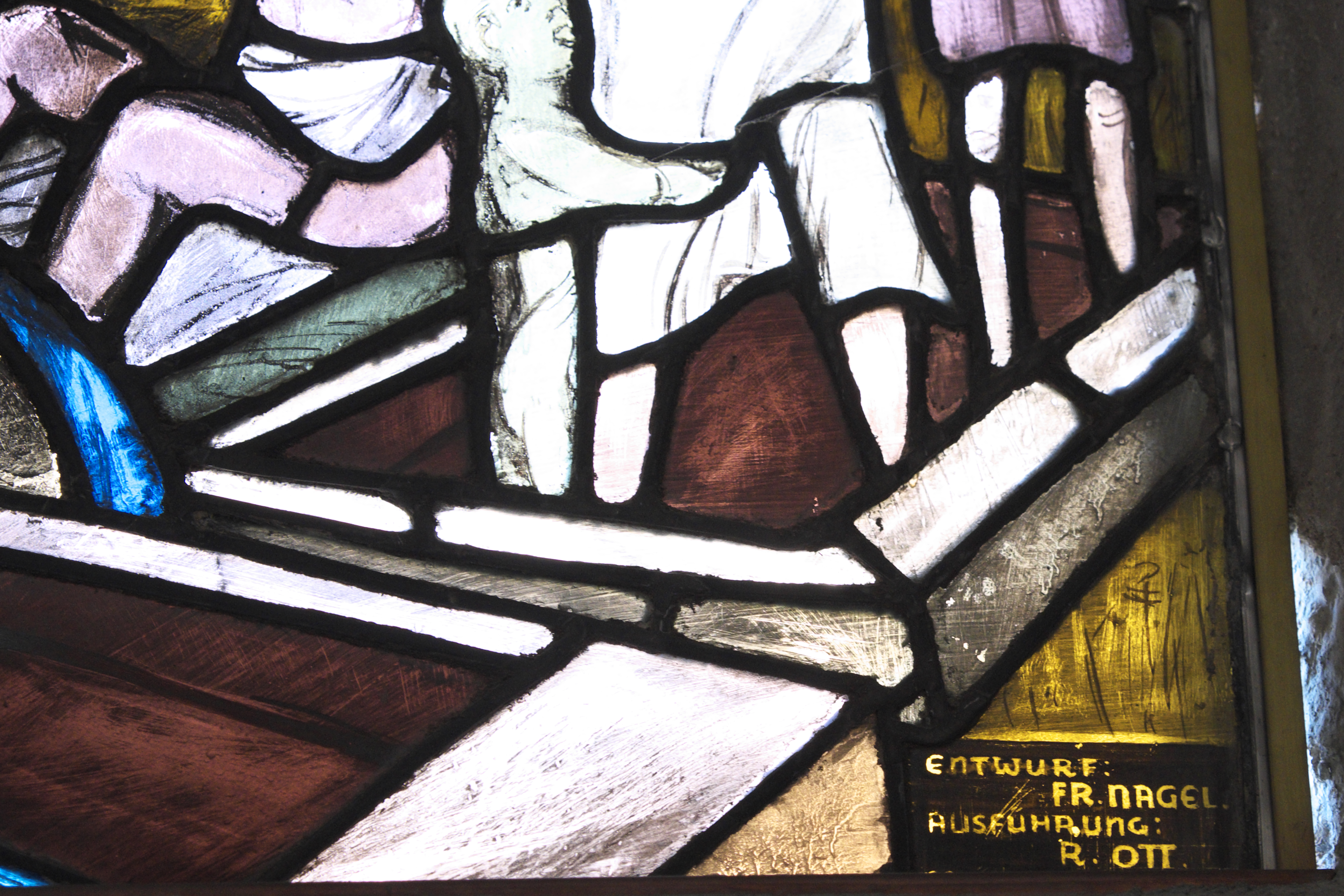 Katholische Pfarrkirche Mariä Empfängnis in Dürrwangen im Landkreis Ansbach (Mittelfranken/Bayern), Bleiglasfenster mit Signatur Franz Nagel